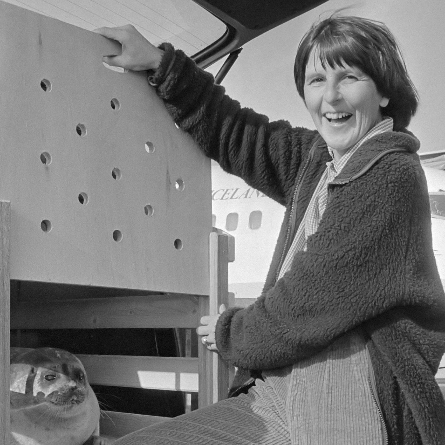 Leidster Lenie 't Hart van de zeehondencrèche in Pieterburen (r) en een stewardess 22 oktober 1982